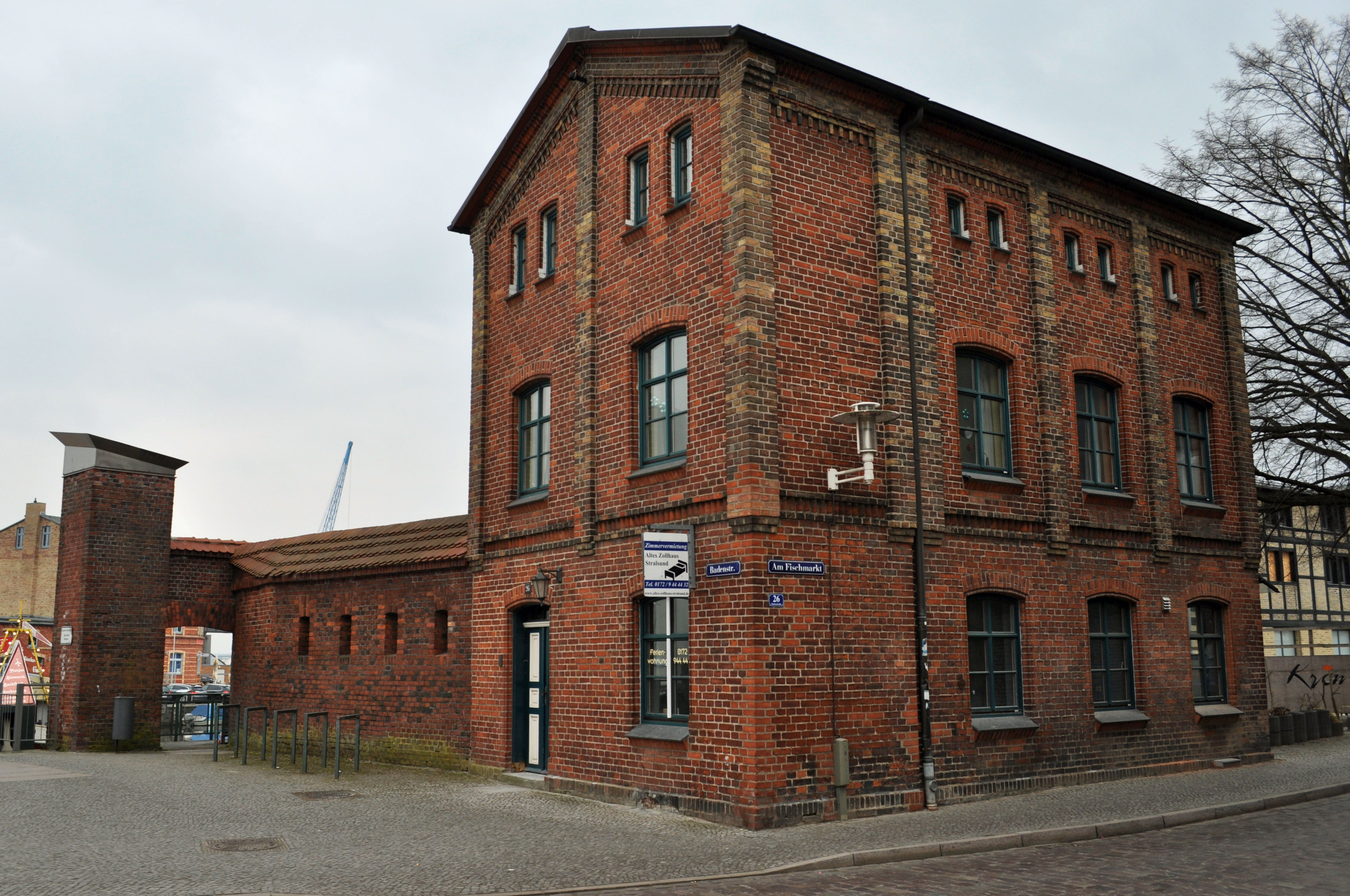 Gebäude bzw. Gebäudedetail in Stralsund. Straße und Hausnummer siehe Dateiname.